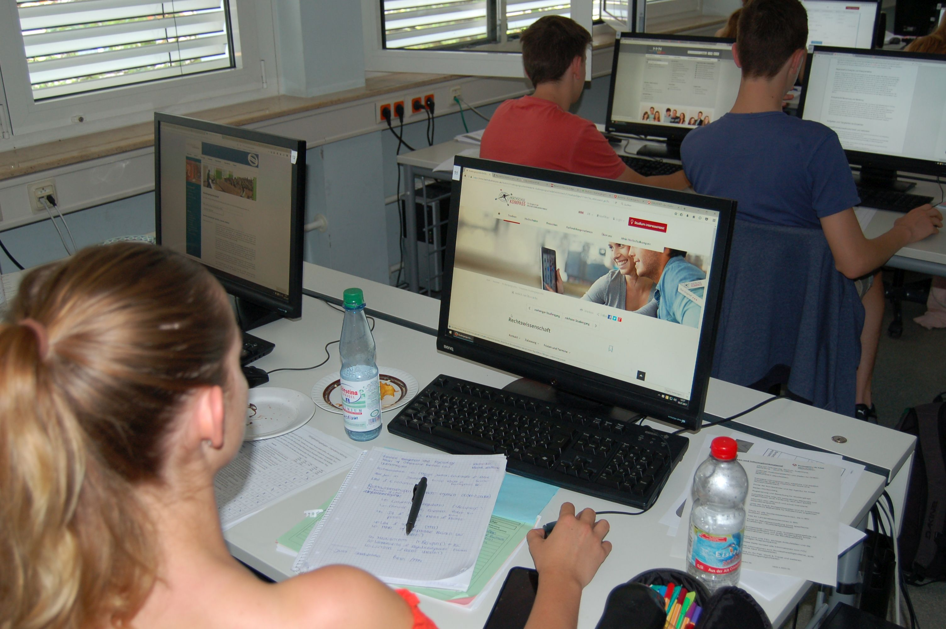 Kaufmännische Schule Tauberbischofsheim (KSTBB) BEST Seminar 2017 Beim Entscheidungstraining BEST – dies steht für „BErufs- und STudienorientierung“ – handelt es sich um ein zweitägiges Entscheidungs- und Zielfindungstraining für Schüler der Oberstufe an allgemeinbildenden und beruflichen Gymnasien in Baden-Württemberg.